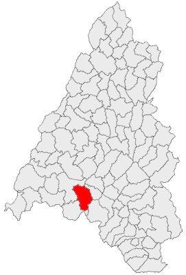 Categorie:Hărţi ale judeţului Bihor